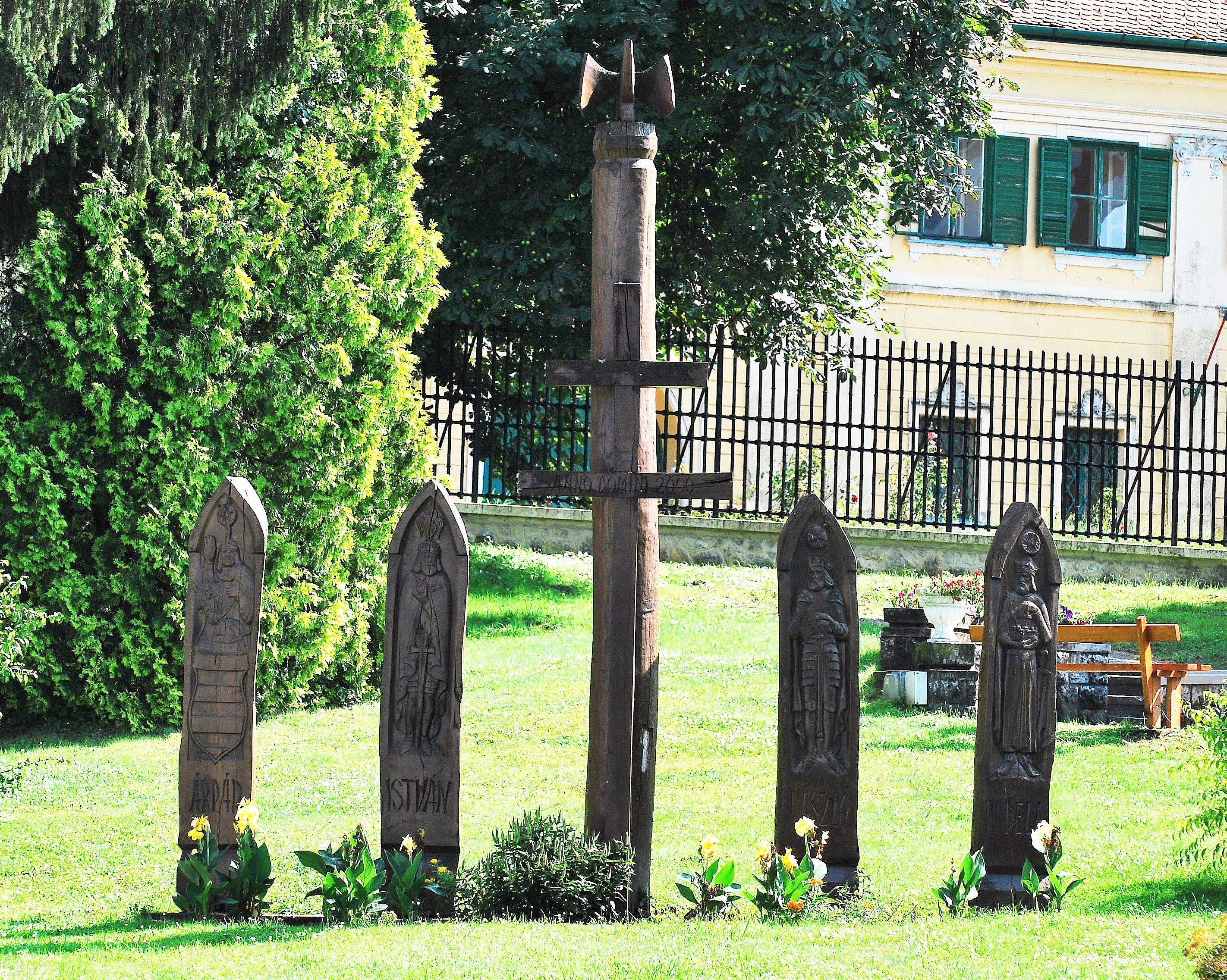 Milleniumi emlékmű Sellyén (Vanyur István alkotása, 2000-ben állították)